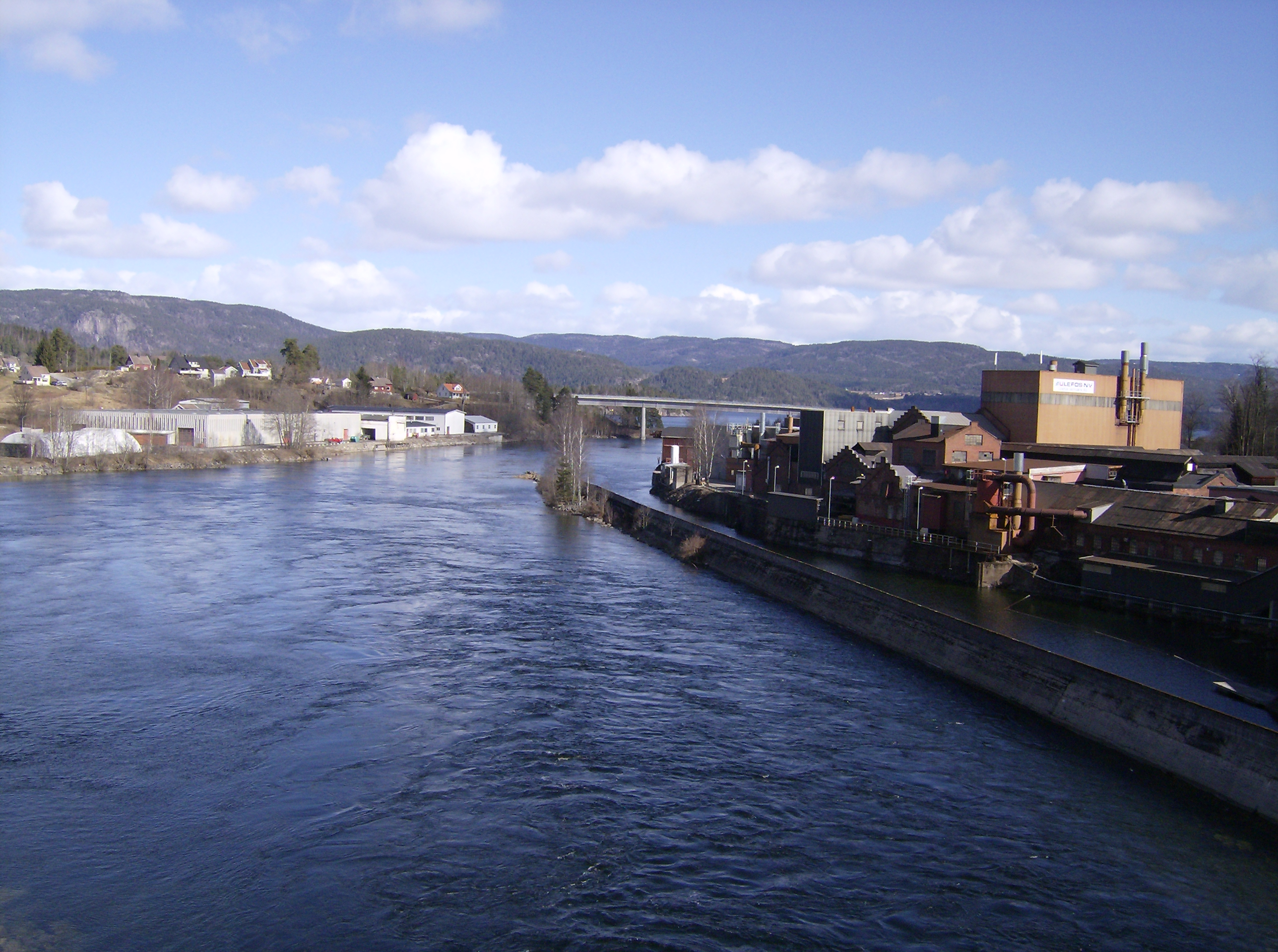 Panorama miasta Ulefoss, środkowa Norwegia